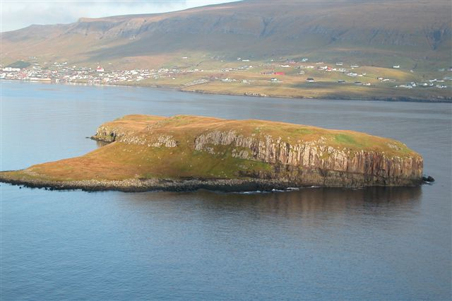 Tjaldavíkshólmur, Suðuroy, Faroe Islands.